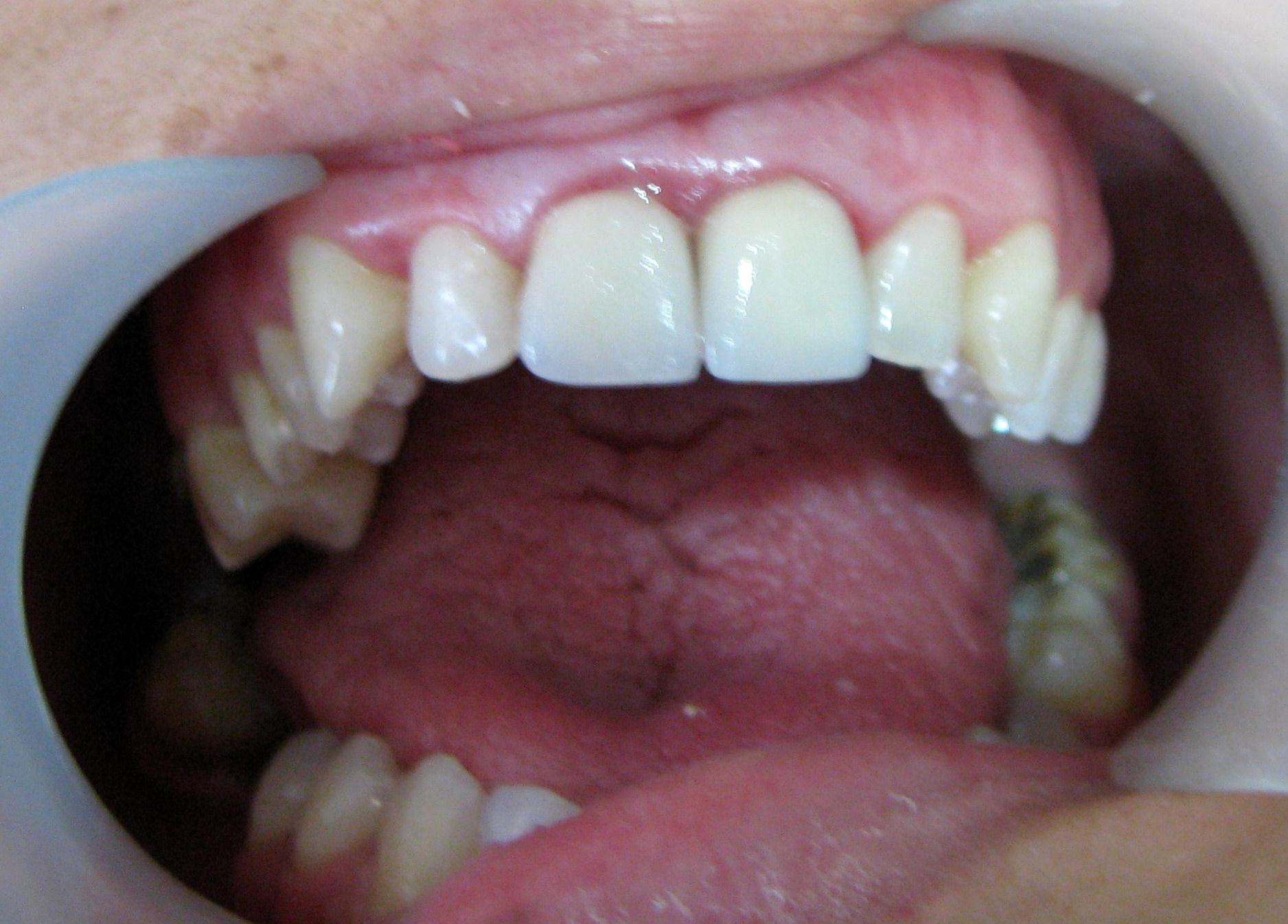 Paciente con provisionales en los dientes 11 y 21.